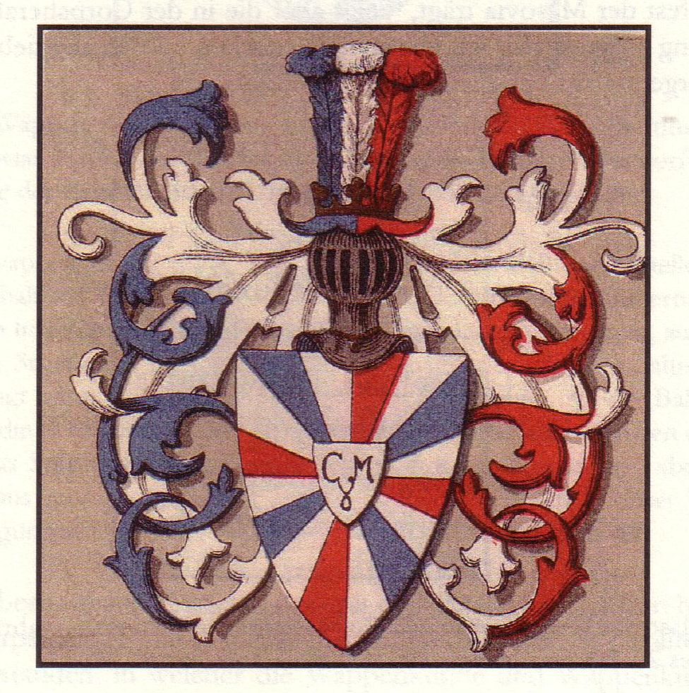 Entwurf eines neuen Wappens für das Corps Masovia